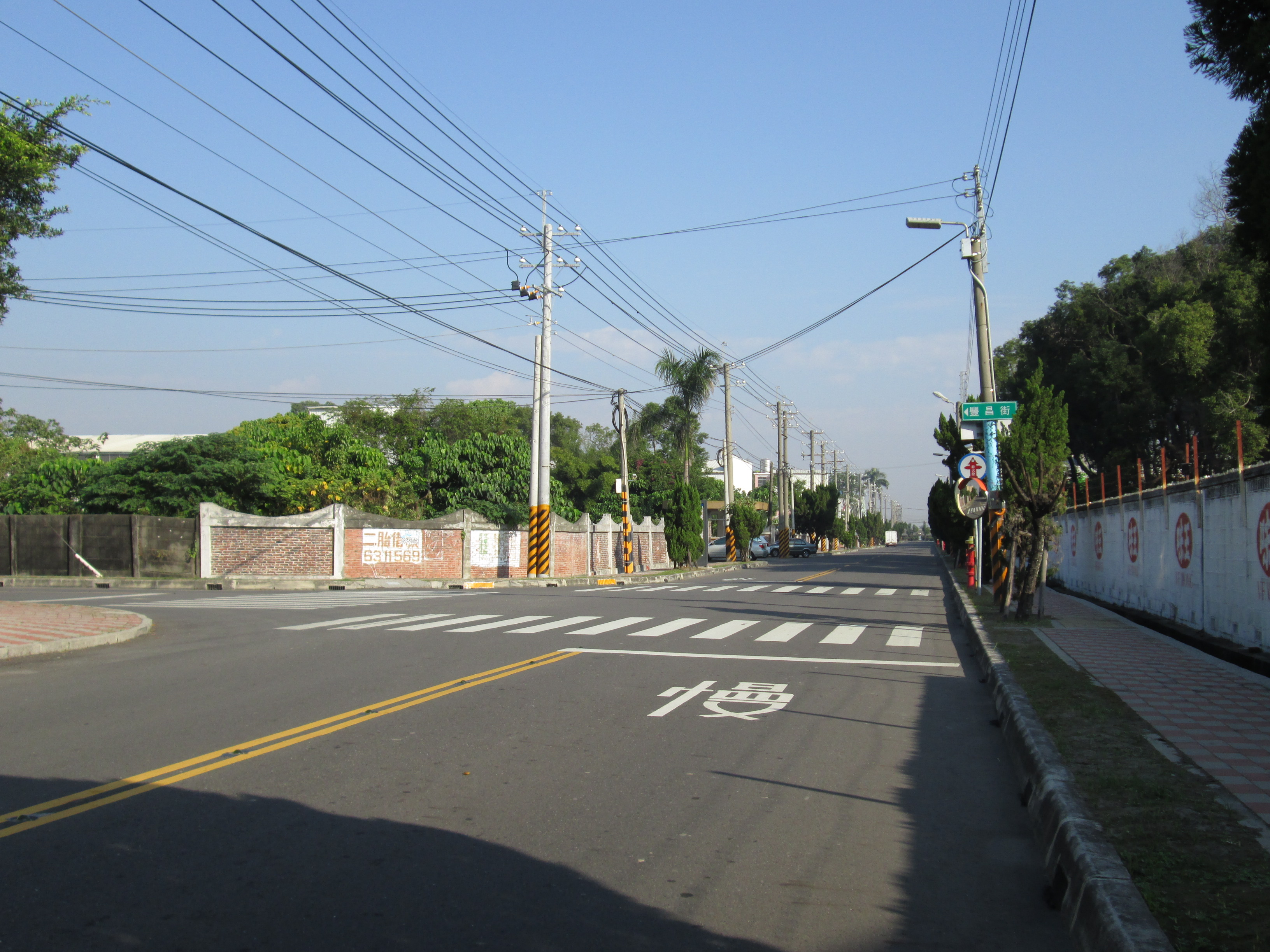 雲林縣大埤鄉 豐田工業區